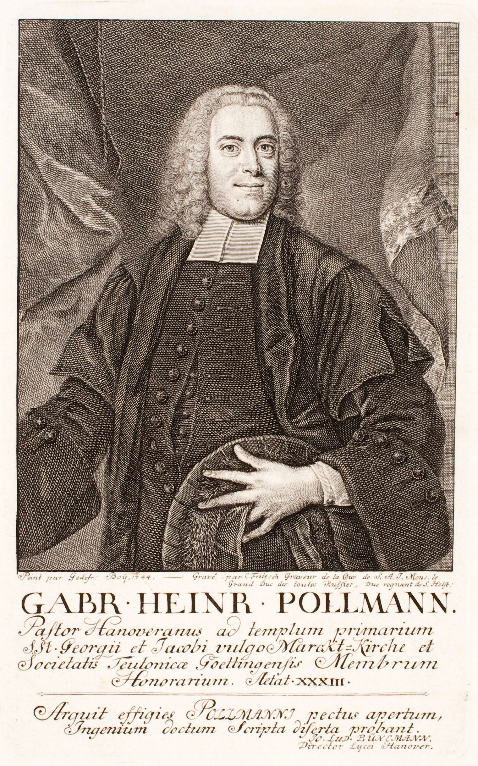 Kupferstich des Graveurs Christian Fritzsch nach einem Gemälde des Hofgraveurs des Zarenhofes Godefried Boy mit einem Hüftbild des lutherischen Theologen und Pastors der Marktkirche von Hannover Gabriel Heinrich Pollmann (1712–1789), der vor einem Vorhang und einem im Hintergrund links zu sehenden Bücherregal steht. Unter dem Bild finden sich in einem Rechteck die Worte „GABR. HEINR. POLLMANN. Pastor Hanoveranus ad templum primarium SSt. Georgii et Jacobi vulgo Marckt-Kirche et Societatis Teutonicae Goettingensis Membrum Honorarium. Aetat(is) XXXIII“ Darunter findet sich ein in lateinischer Sprache von dem Rektor der hannoverschen Schule Johann Ludolf Bünemann verfasstes Distichon mit den Versen „Arguit effigies POLLMANNI pectus apertum Ingenium doctum Scripta diserta probant“ Das Blatt mit den Maßen 220 x 155 mm (hier ein Ausschnitt) und den Plattenmaßen 167 x 105 mm (Bildmaße 121 x 97 mm) findet sich in der Porträtsammlung der Herzog-August-Bibliothek in Wolfenbüttel.